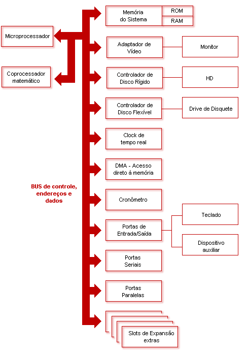 Representação simples de blocos de elementos funcionais do computador.